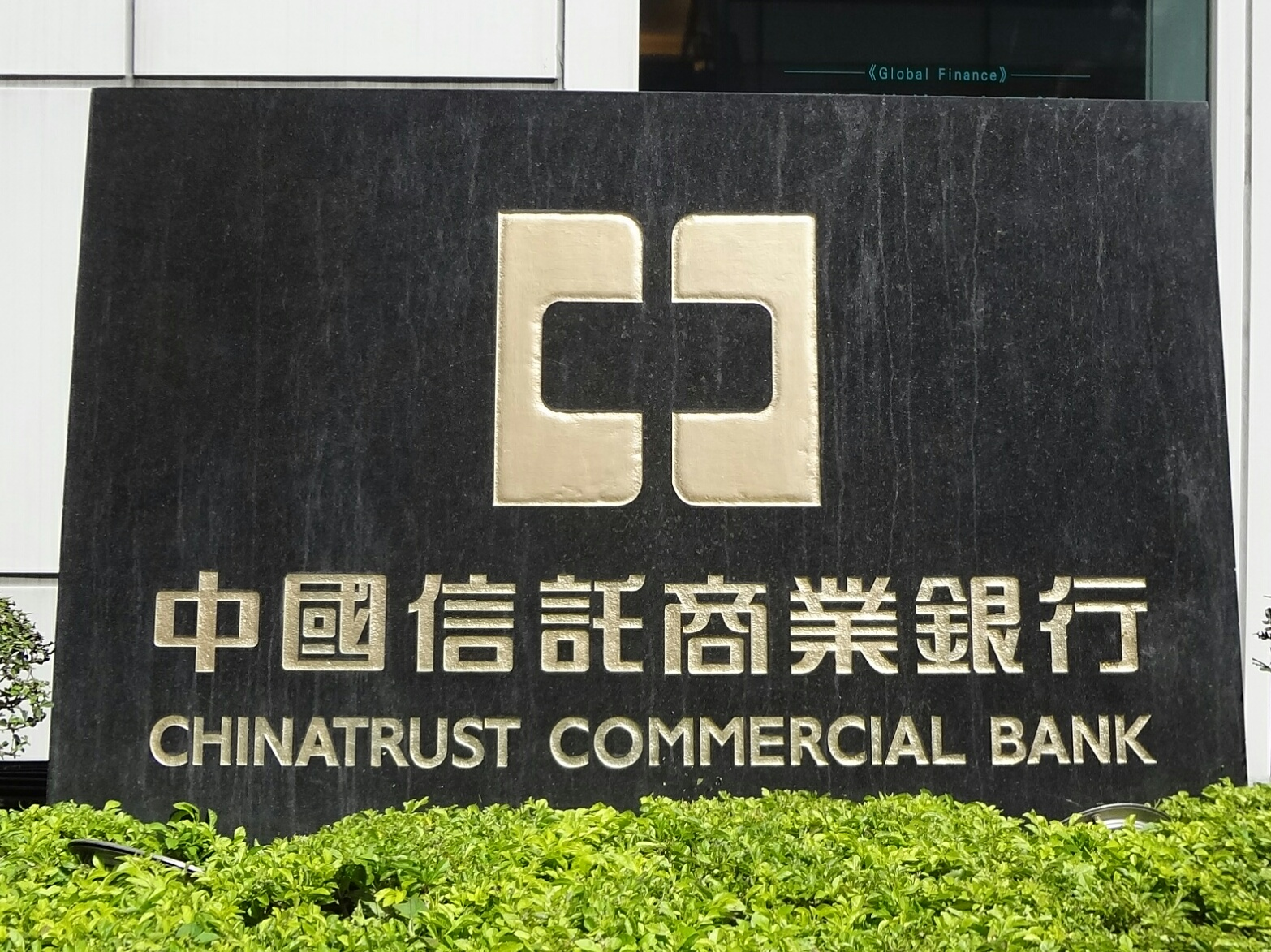 中國信託商業銀行總部大樓大門左側，中國信託商業銀行第一代標誌刻石。